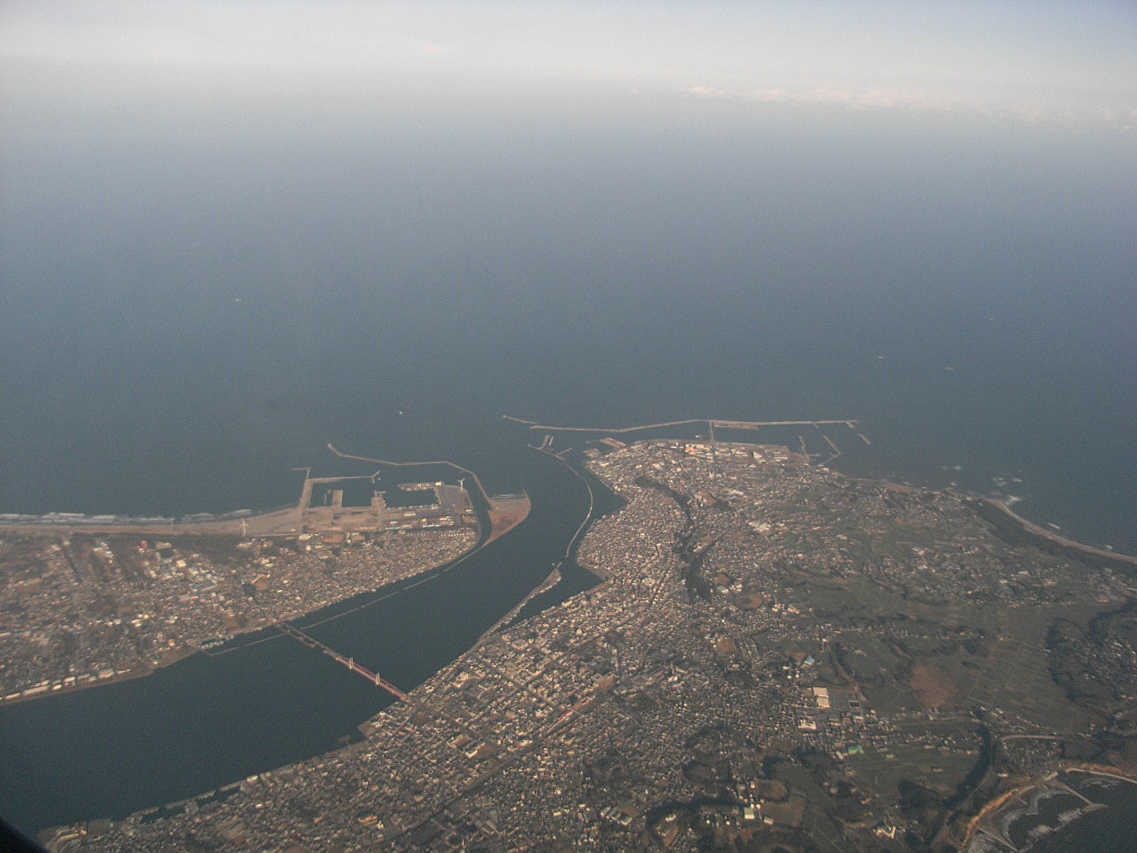 利根川河口と銚子市、神栖市波崎地区中心市街、銚子大橋空撮